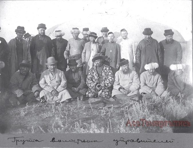 Группа казахских волостных управителей в 1909 году. Скорее всего на фото волостные управители Атбасарского уезда